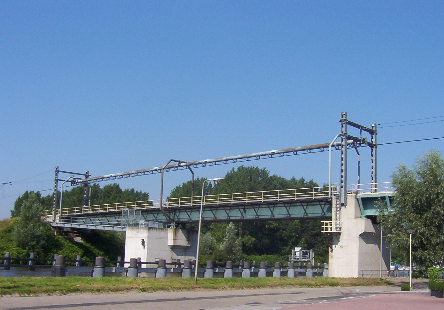 Eigen foto aug. 2005, gebruik onder GFDL vrij Categorie:Afbeelding Gouda